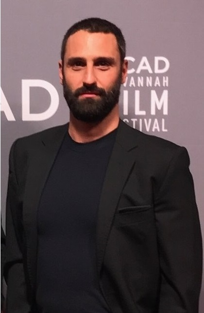 Calvani al Savannah Film Festival 2017